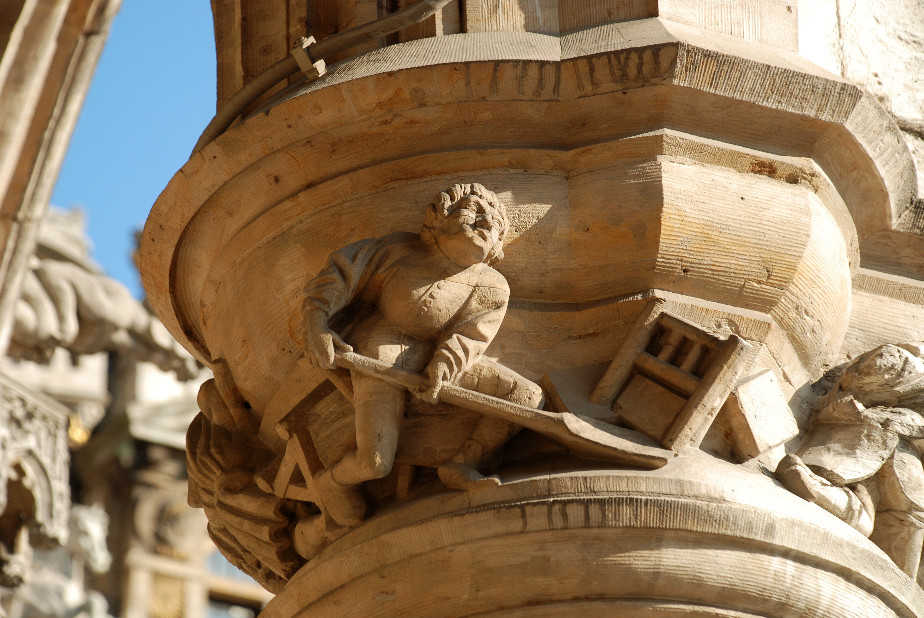 Belgique - Bruxelles - Grand-Place - Hôtel de Ville - Maison de l'Estrapade (Scupstoel)